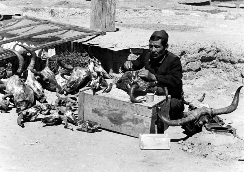 Schigatse, Präparator